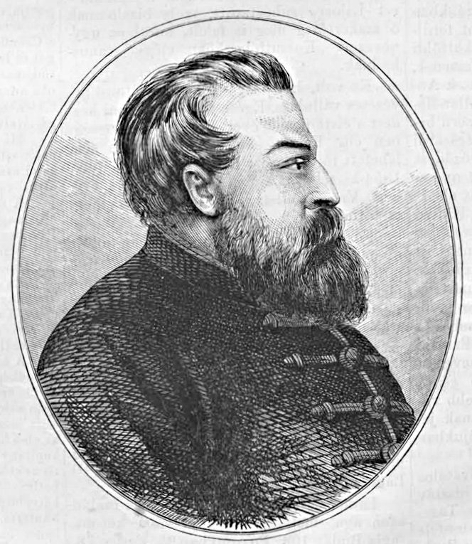 Landerer Lajos (1800–1854) nyomdász (Vasárnapi Ujság, 1867. augusztus 11.)